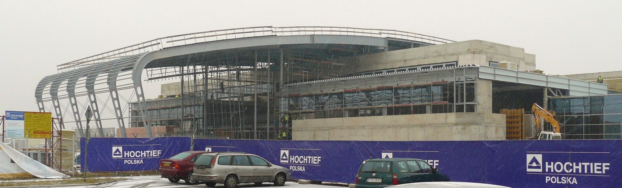 Lotnisko w Poznaniu (2011)